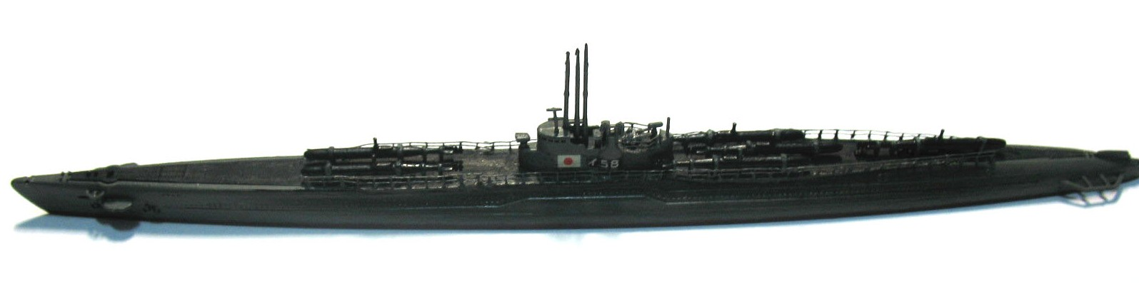 大日本帝国海軍の伊号第五八潜水艦（後期型）の模型